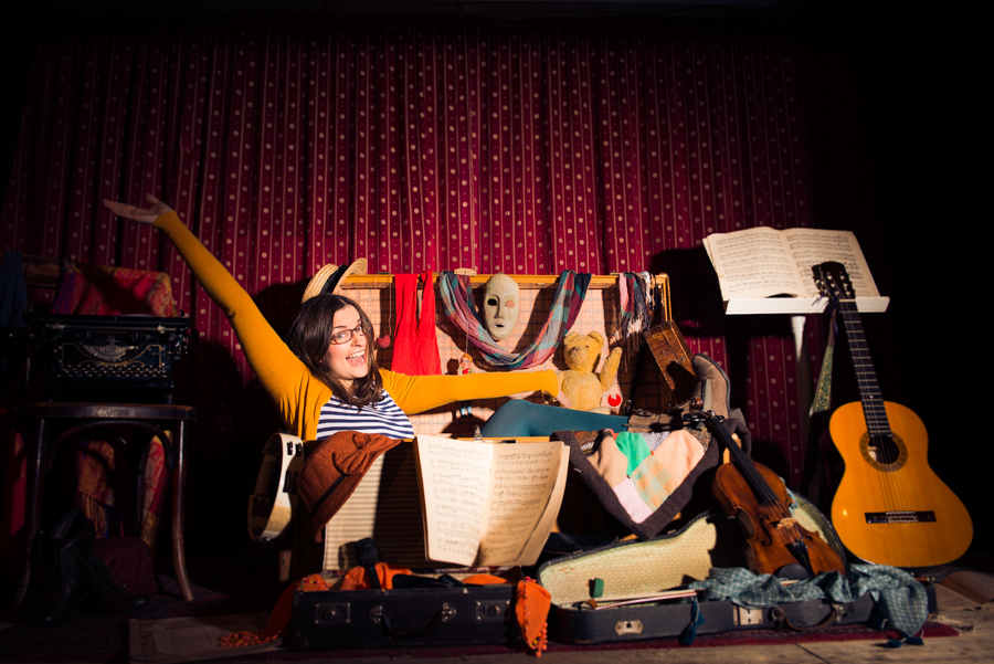 die österreichische Kabarettistin Guggi Hofbauer - Guggis Kleinkunstfundus @ Mike's Werkstatt 1030 Wien